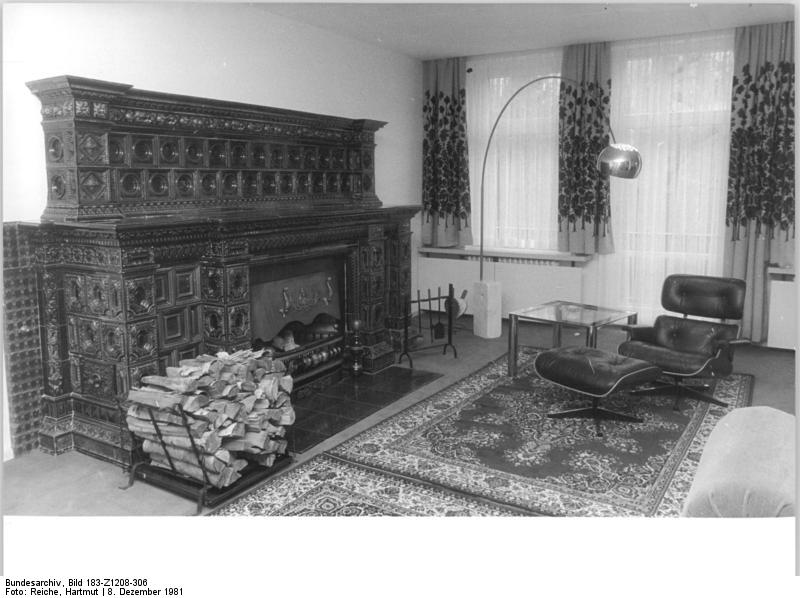 Jagdschloss Hubertusstock, Kaminzimmer ADN-ZN-Reiche-8.12.81 Bezirk Frankfurt-Oder: Kaminzimmer im Jagdschloß Hubertusstock.